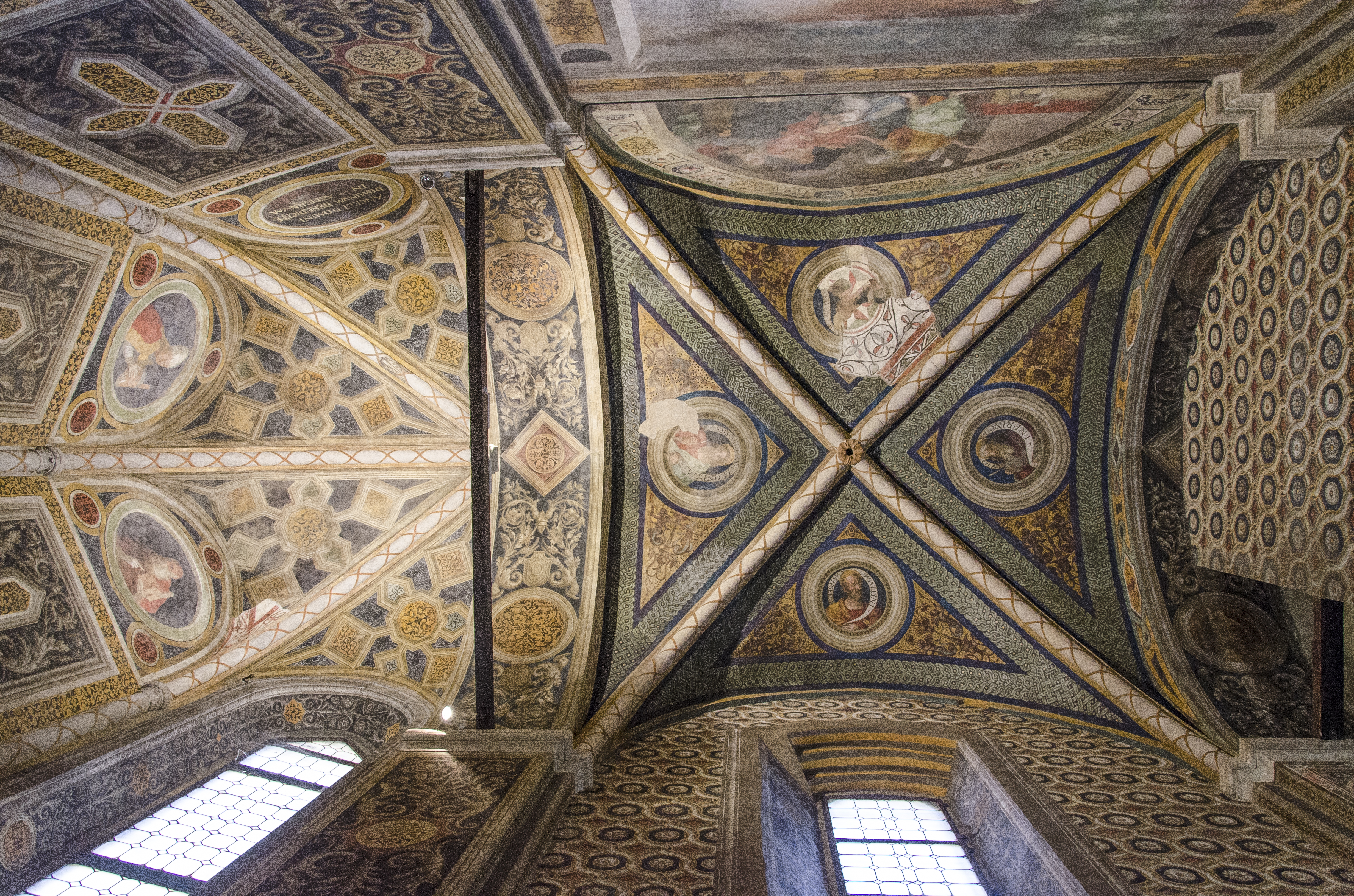 Chiesa di Sant'Eufemia - cappella Spolverini Dal Verme